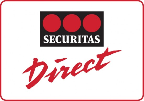 Securitas Direct's logotype